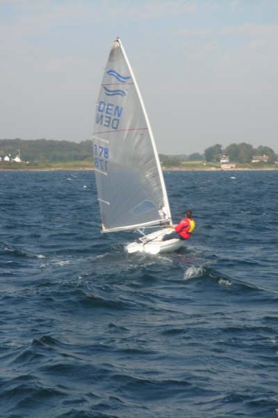 Finn dinghy in Karrebæksminde, Denmark Skipper: Søren Svare